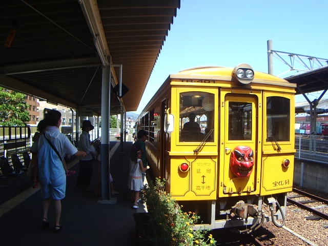 撮影：takasunrise0921